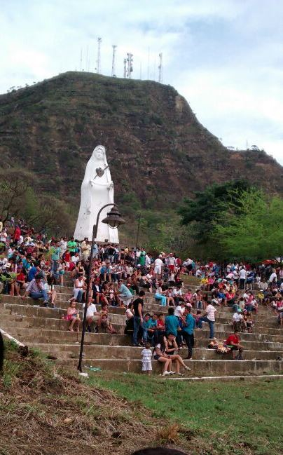 virgen de manare en epoca de Semana santa